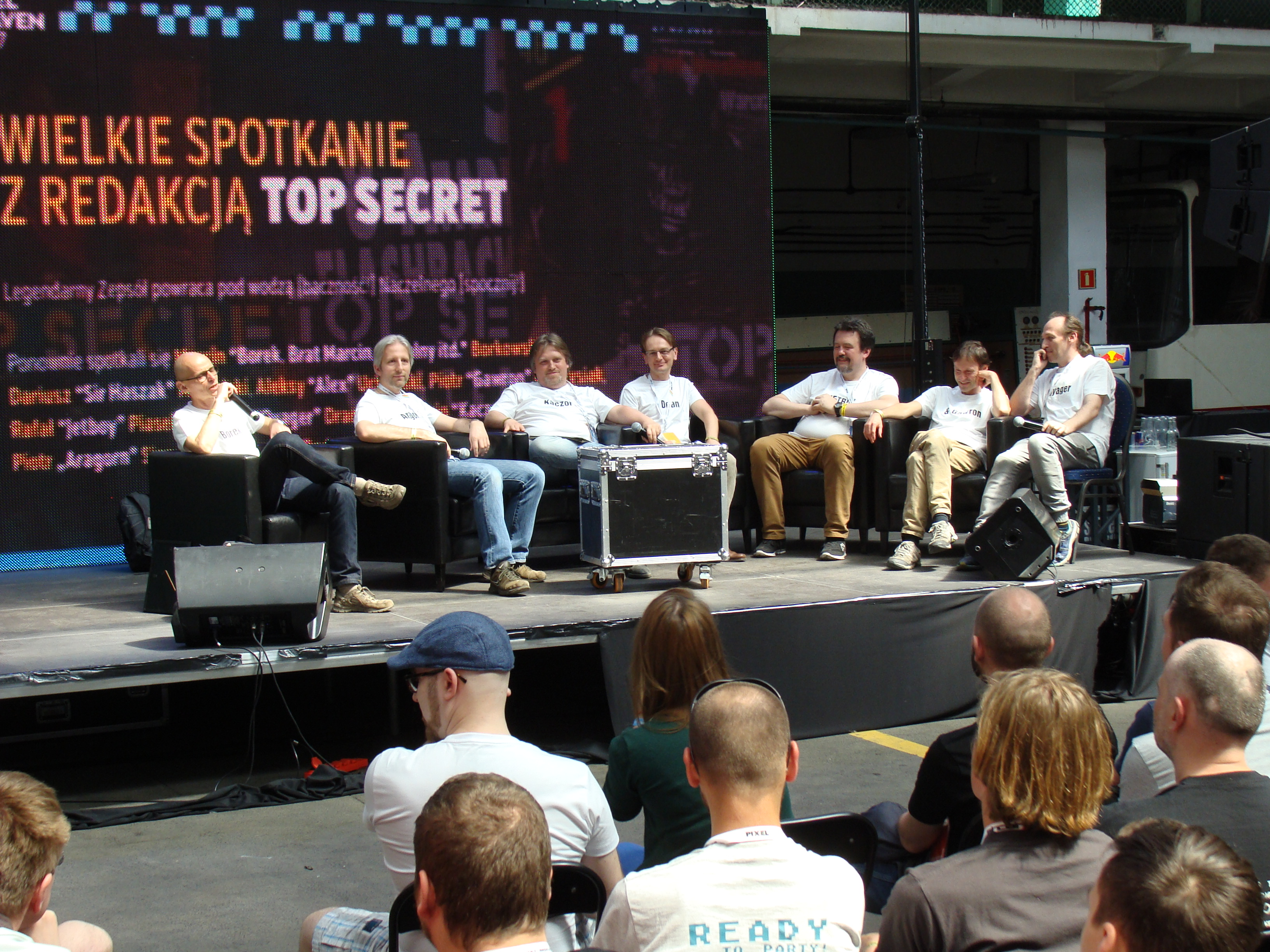 Spotkanie członków redakcji czasopisma "Top Secret" podczas festiwalu Pixel Heaven, 27 maja 2017, Warszawa